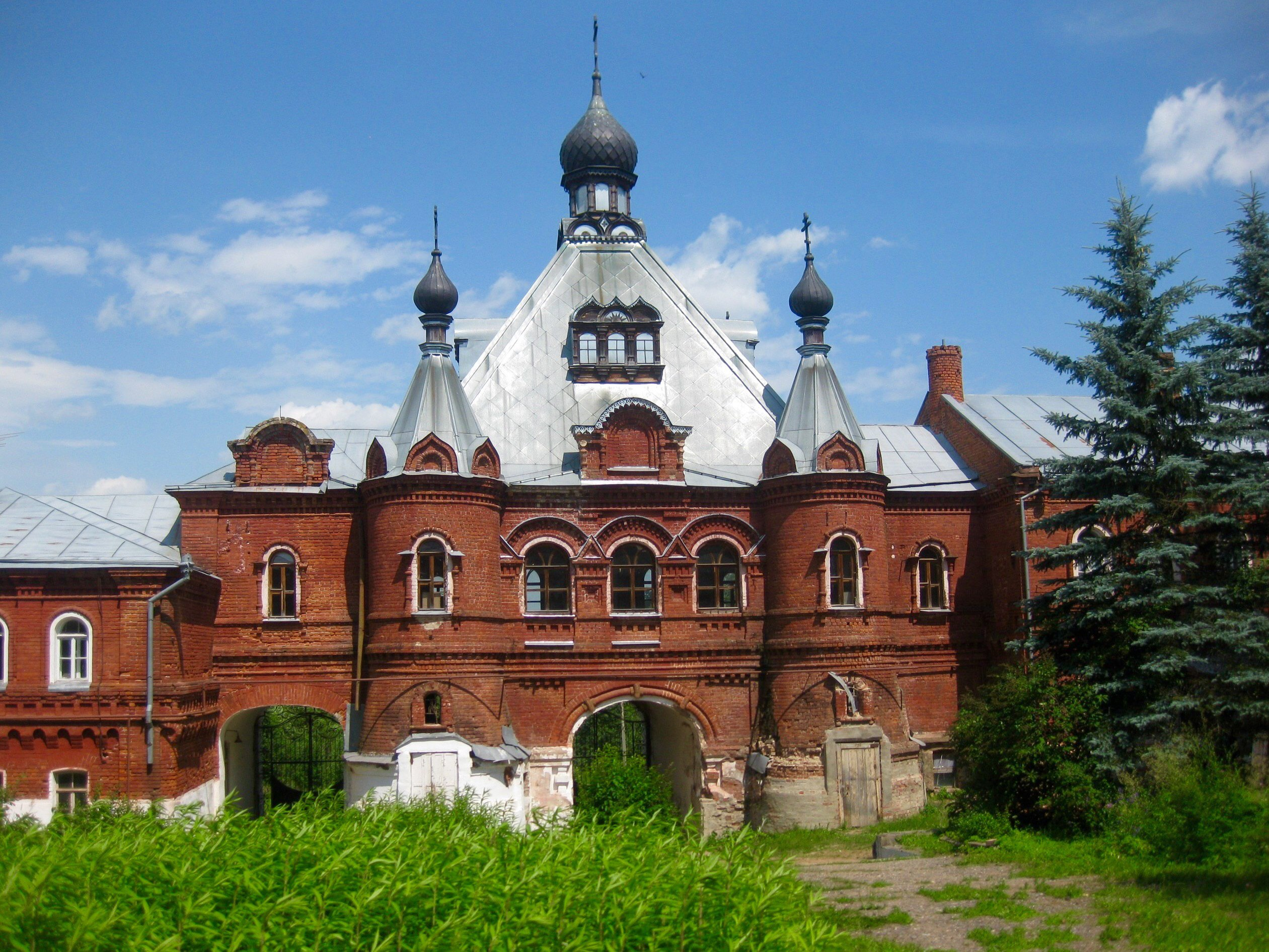 Церковь Всех Святых надвратная: Зосимова Пустынь, Александровский район, Владимирская область